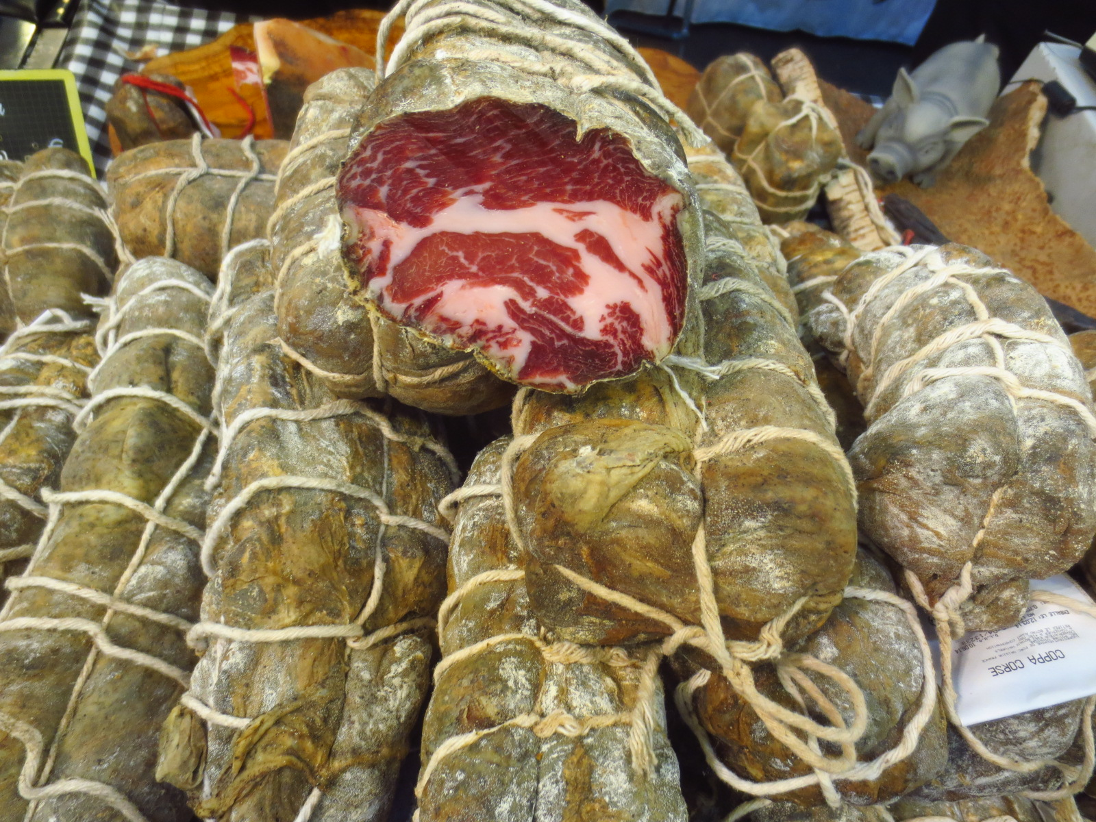 Coppa Corse